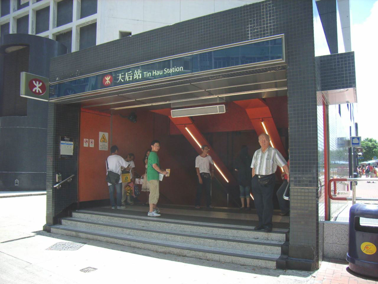 香港地鐵港島綫天后站A1 出口, 英皇道